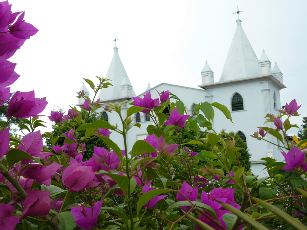 San Antonio.Paraguay